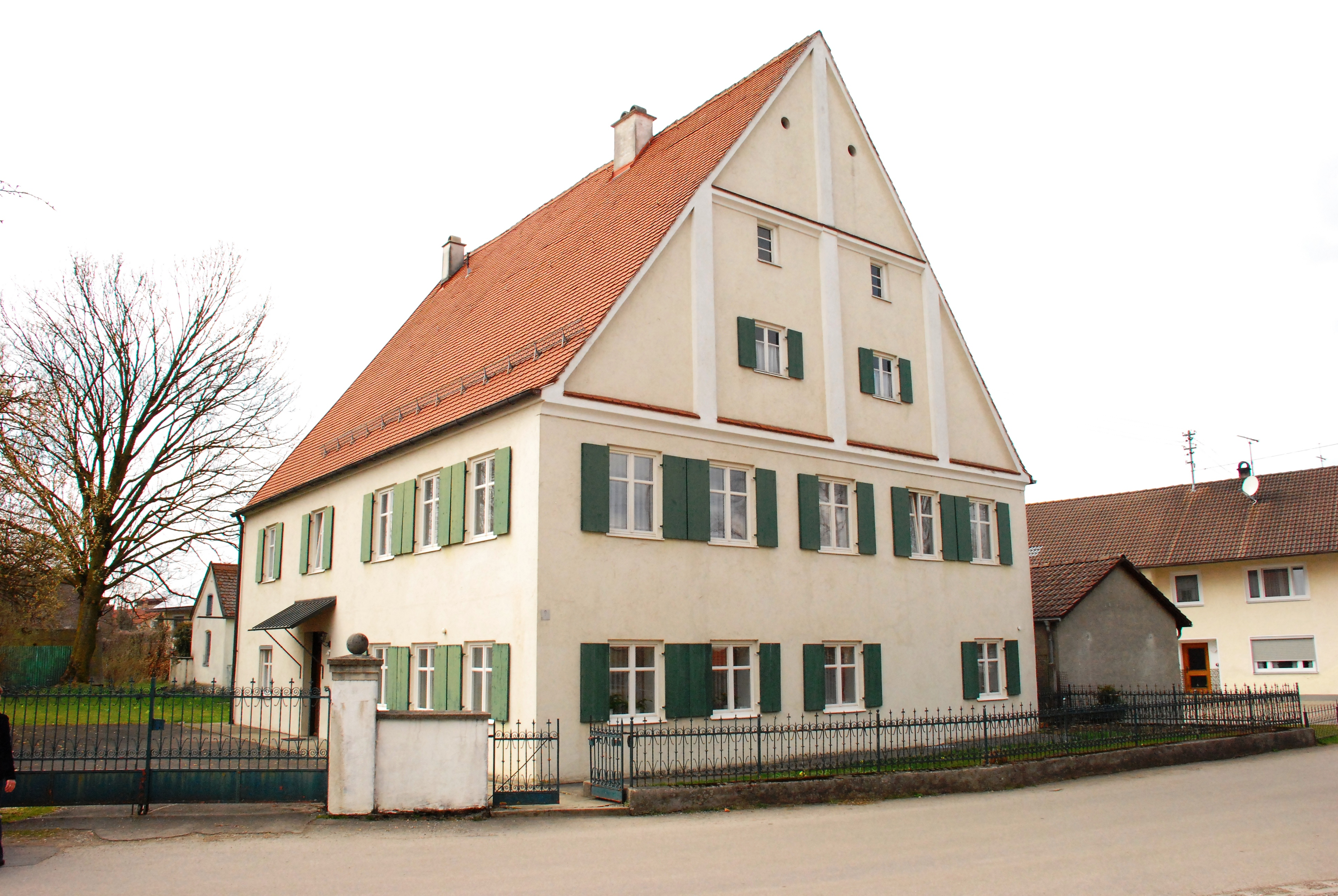 Pfarrhaus der katholischen Kirche St. Johannes in Baisweil, Landkreis Ostallgäu, Regierungsbezirk Schwaben, Bayern. Gebäude als Baudenkmal unter Aktennummer D-7-77-114-5 in der Bayerischen Denkmalliste aufgeführt.